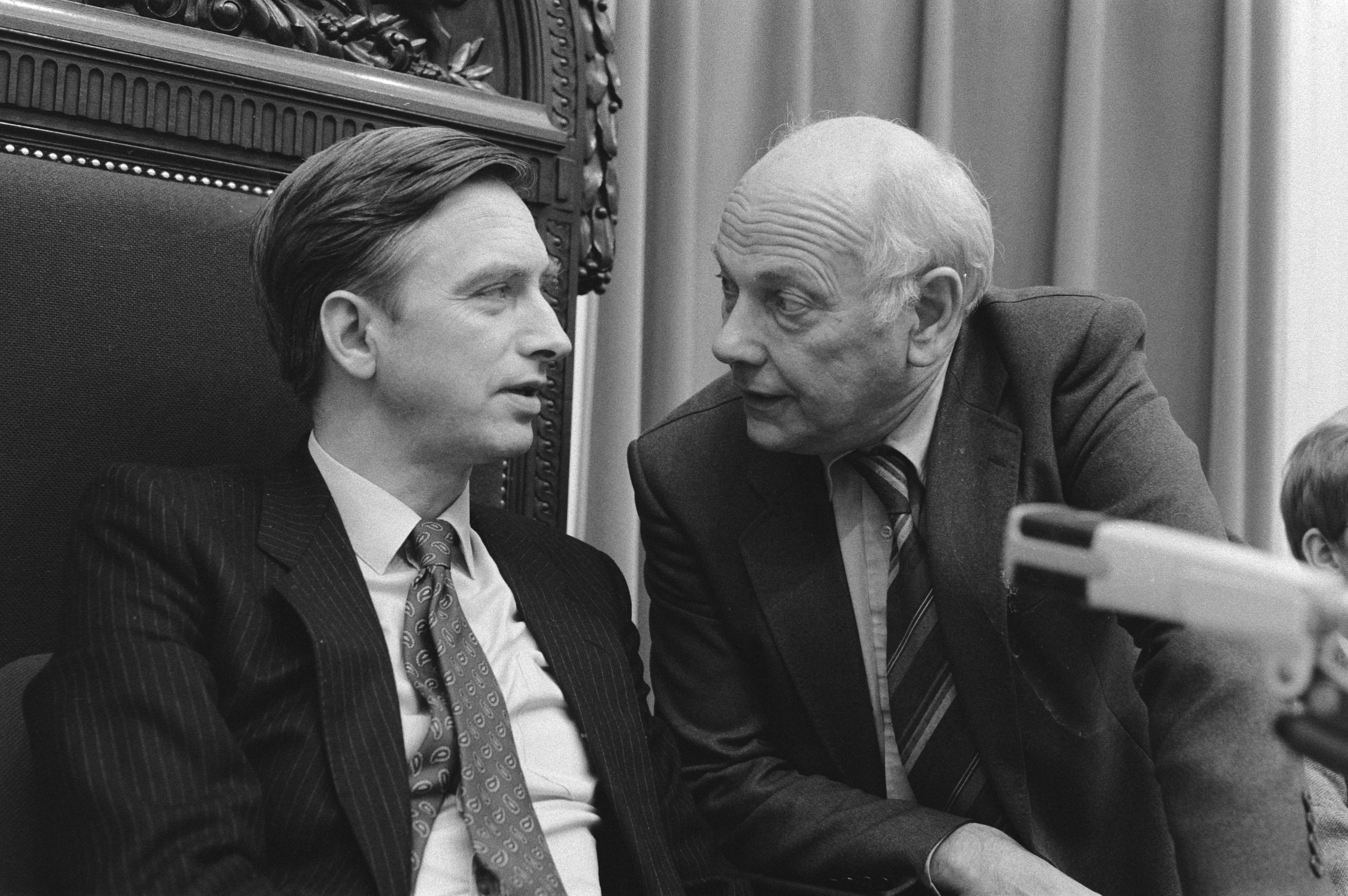 Collectie / Archief : Fotocollectie Anefo Reportage / Serie : [ onbekend ] Beschrijving : Vanmiddag werd er in de Tweede Kamer door de regering antwoord gegeven inzake de wetswijziging abortus,Dolman in gesprek met Den Uyl Datum : 16 december 1980 Trefwoorden : GESPREKKEN, REGERING, abortussen Persoonsnaam : Uyl, Joop den Fotograaf : Antonisse, Marcel / Anefo Auteursrechthebbende : Nationaal Archief Materiaalsoort : Negatief (zwart/wit) Nummer archiefinventaris : bekijk toegang 2.24.01.05 Bestanddeelnummer : 931-2094